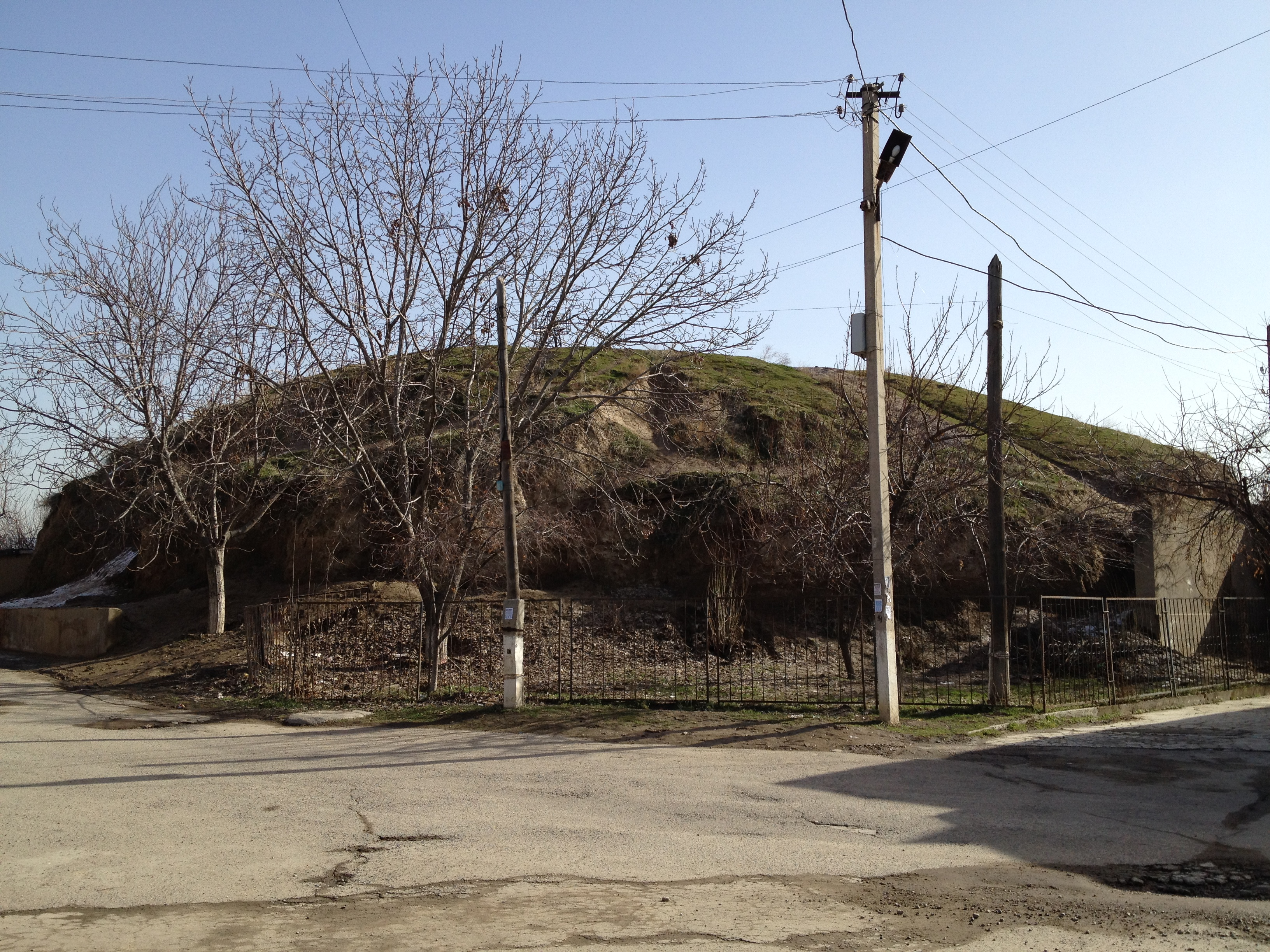 Общий вид городища Фазылтепа (Канглы-Курган)